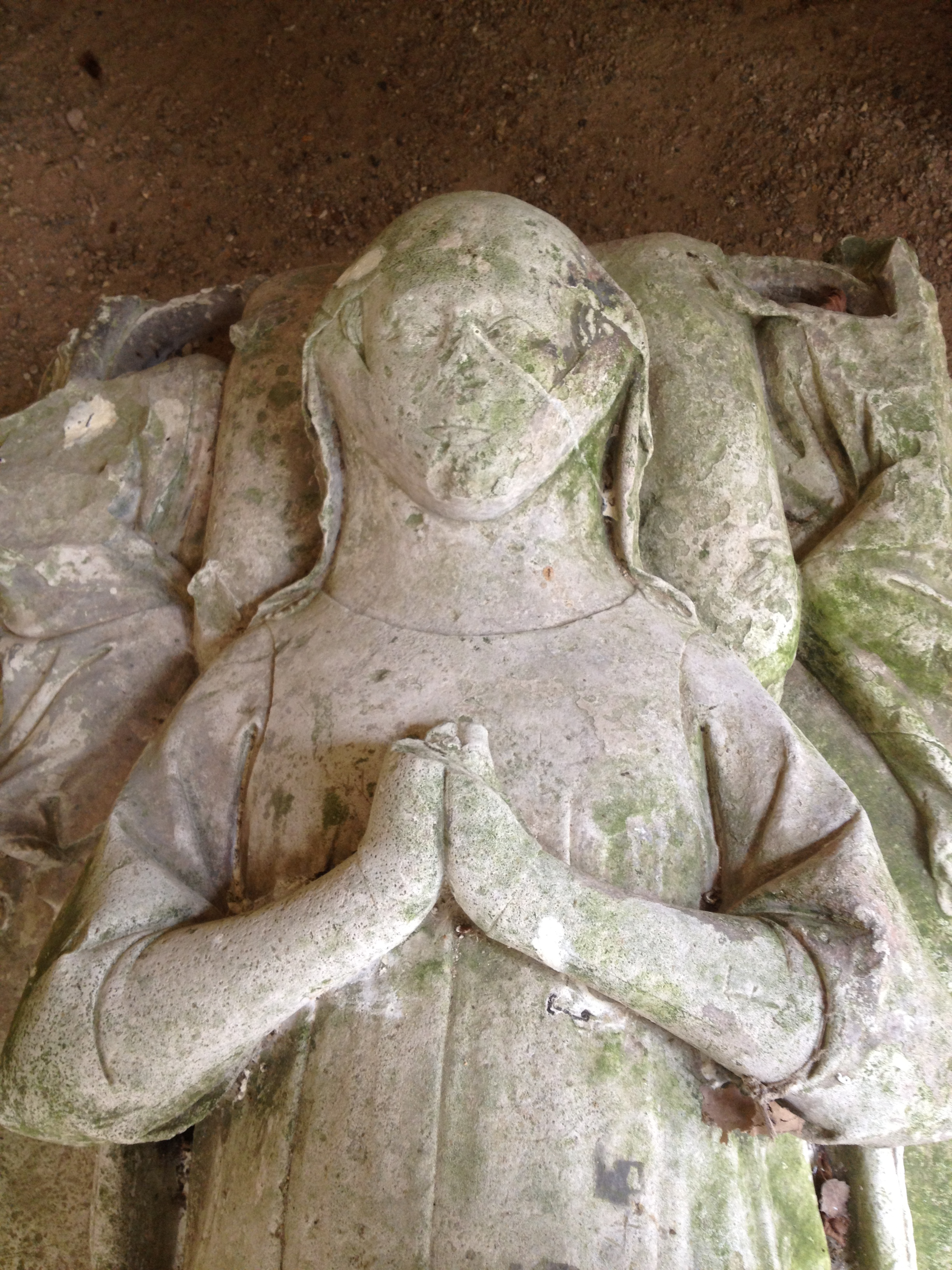 Détail du gisant de Marie de Ferrières.